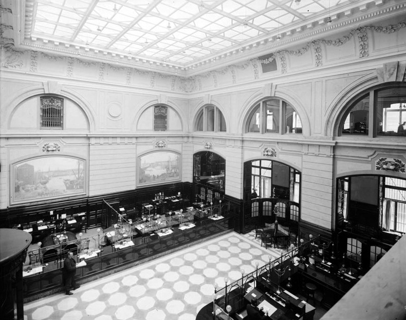 Interiör från Handelsbanken vid Kungsträdgårdsgatan 2 B